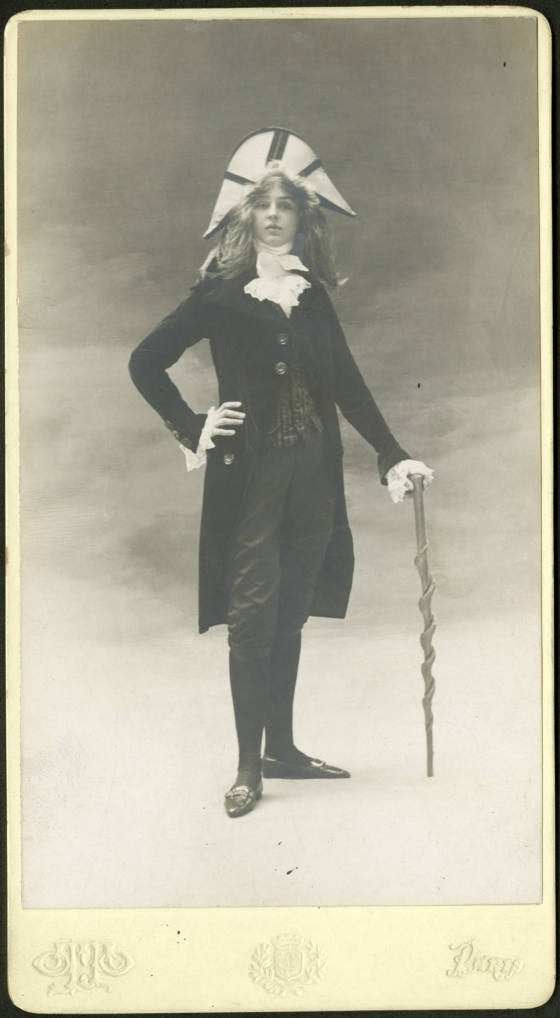 Portrait de Renée Vivien par Otto Wegener, conservé dans les archives de la Smithsonian Institution (numéro SIA2015-006918)